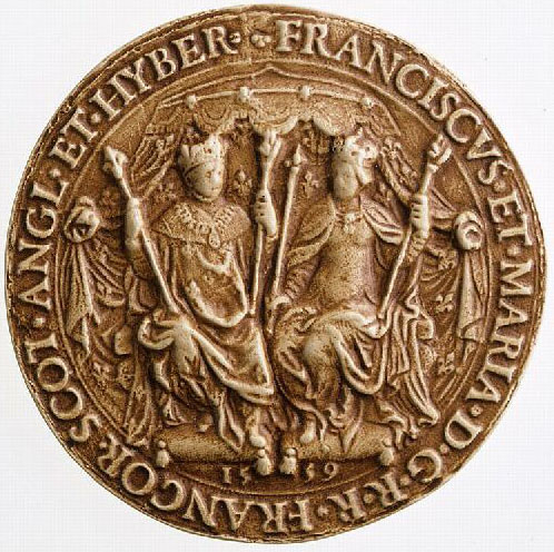 Moulage du sceau de François II et Marie Stuart, roi et reine de France. Légende restituée en latin : "FRANCISCUS ET MARIA DEI GRACIA REGES FRANCORUM, SCOTIAE, ANGLIAE ET HIBERNIAE", traduction : François et Marie, par la grâce de Dieu rois de France, d'Ecosse, d'Angleterre et d'Irlande.